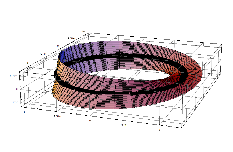 ejemplo de círculo encajado en una banda-de-mobius, rendered with mathematica v.5